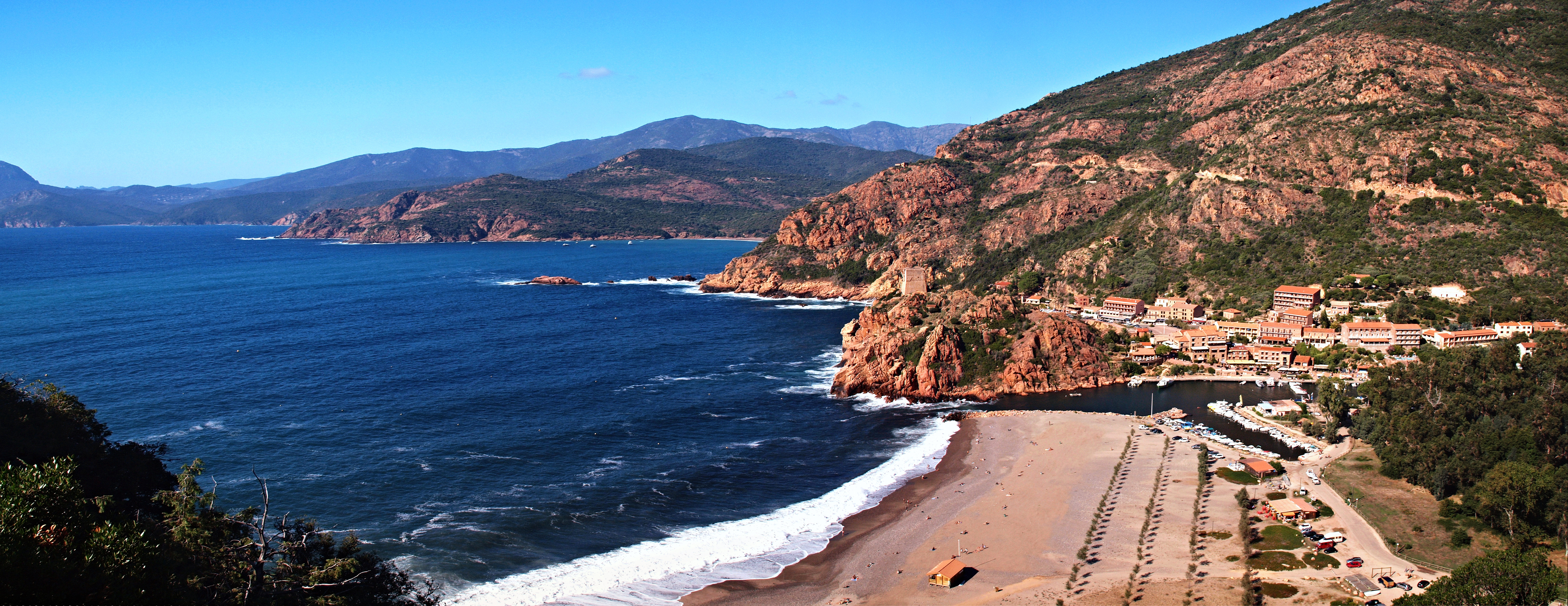 Ota (Corsica) - Porto Marina